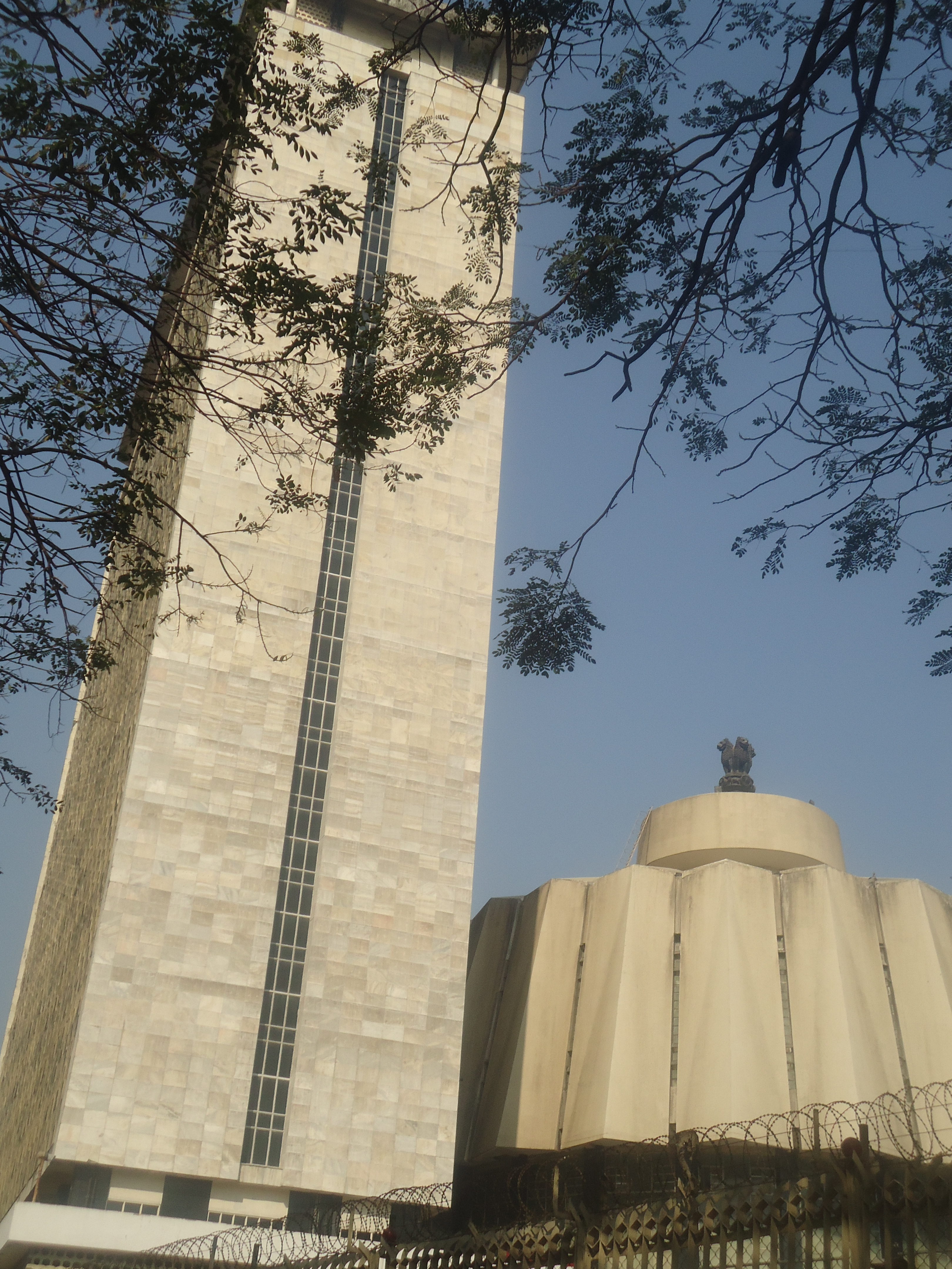 Vidhan Bhavan(Legislative assembly building) at Mumbai,Maharashtra